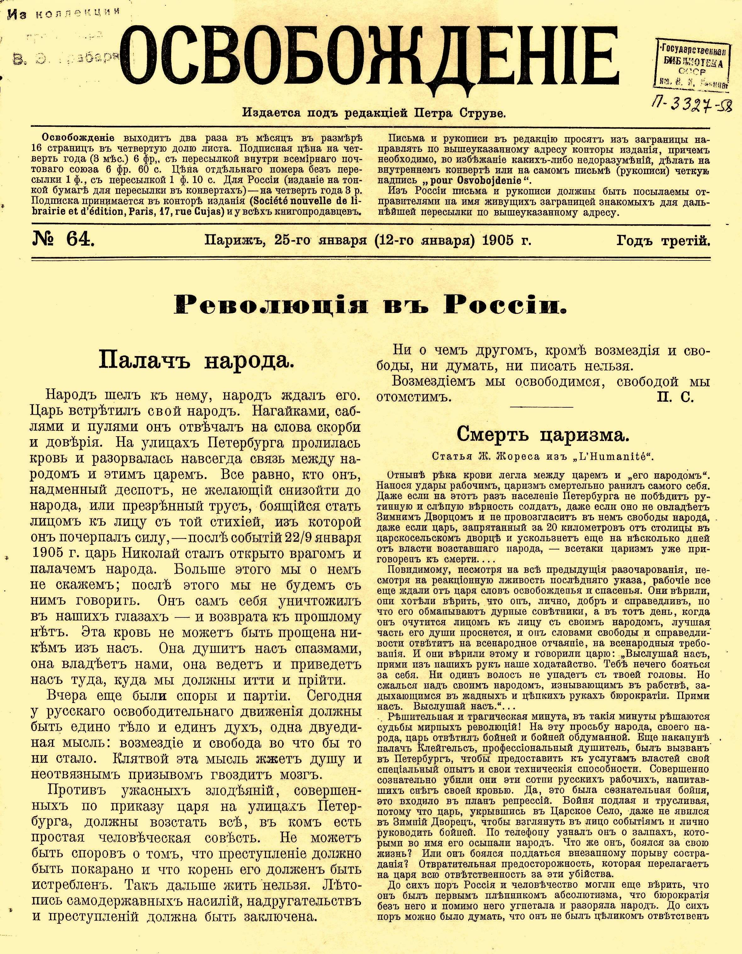 Первая страница журнала "Освобождение" от 25 января 1905 года, возвестившего о начале русской революции.